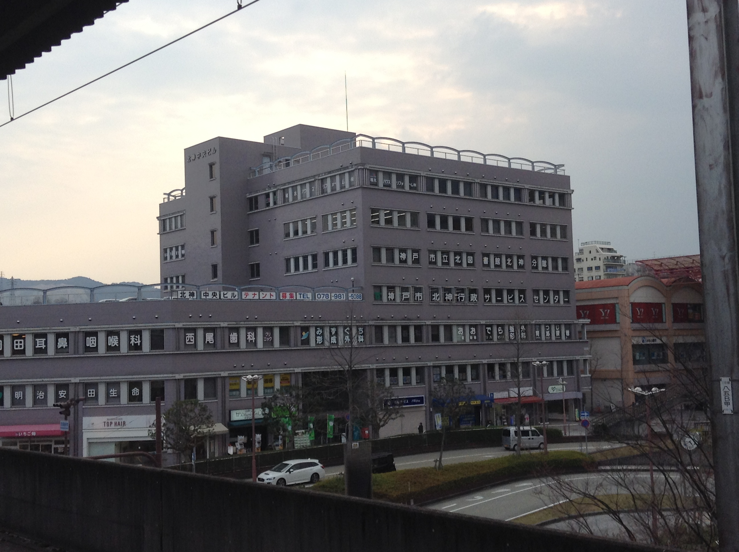 神戸市の神戸市立図書館 北図書館 北神分館（５階フロア）の写真